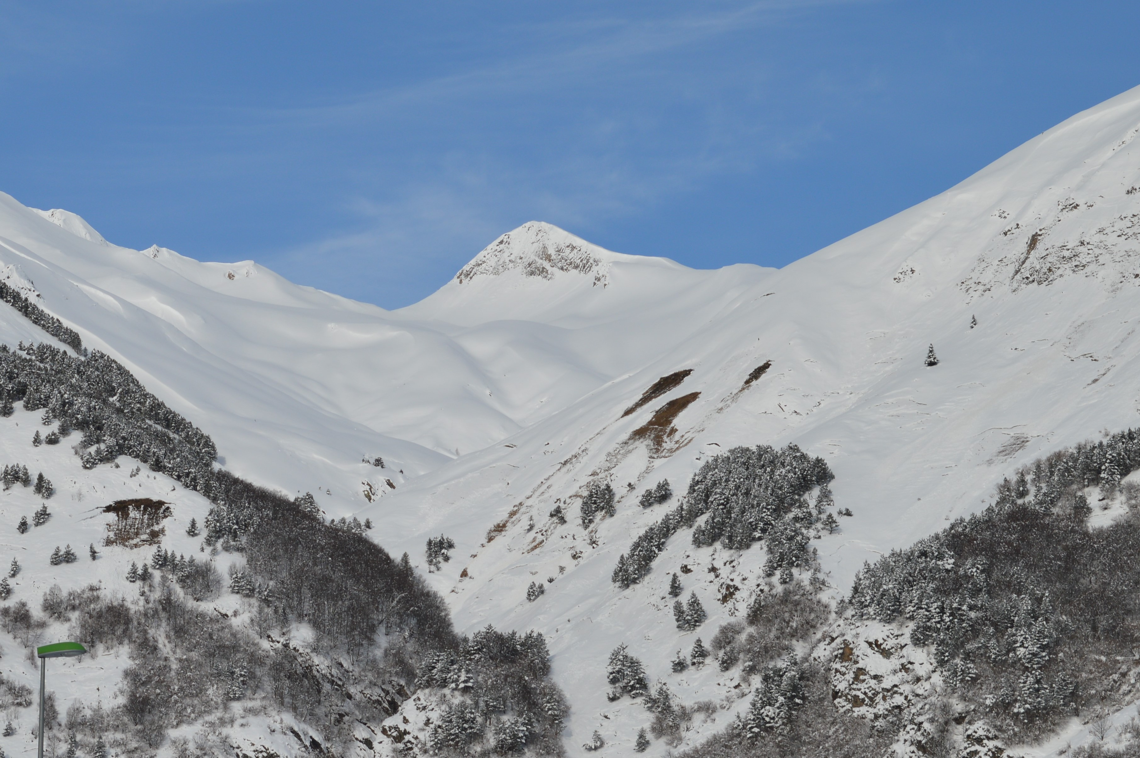 Tuc de Cuenques